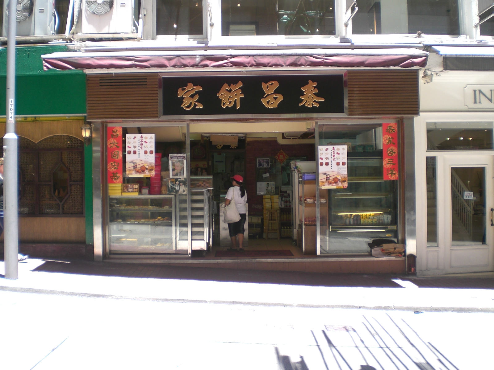 中環擺花街近中環至半山自動扶梯系統的泰昌餅家分店